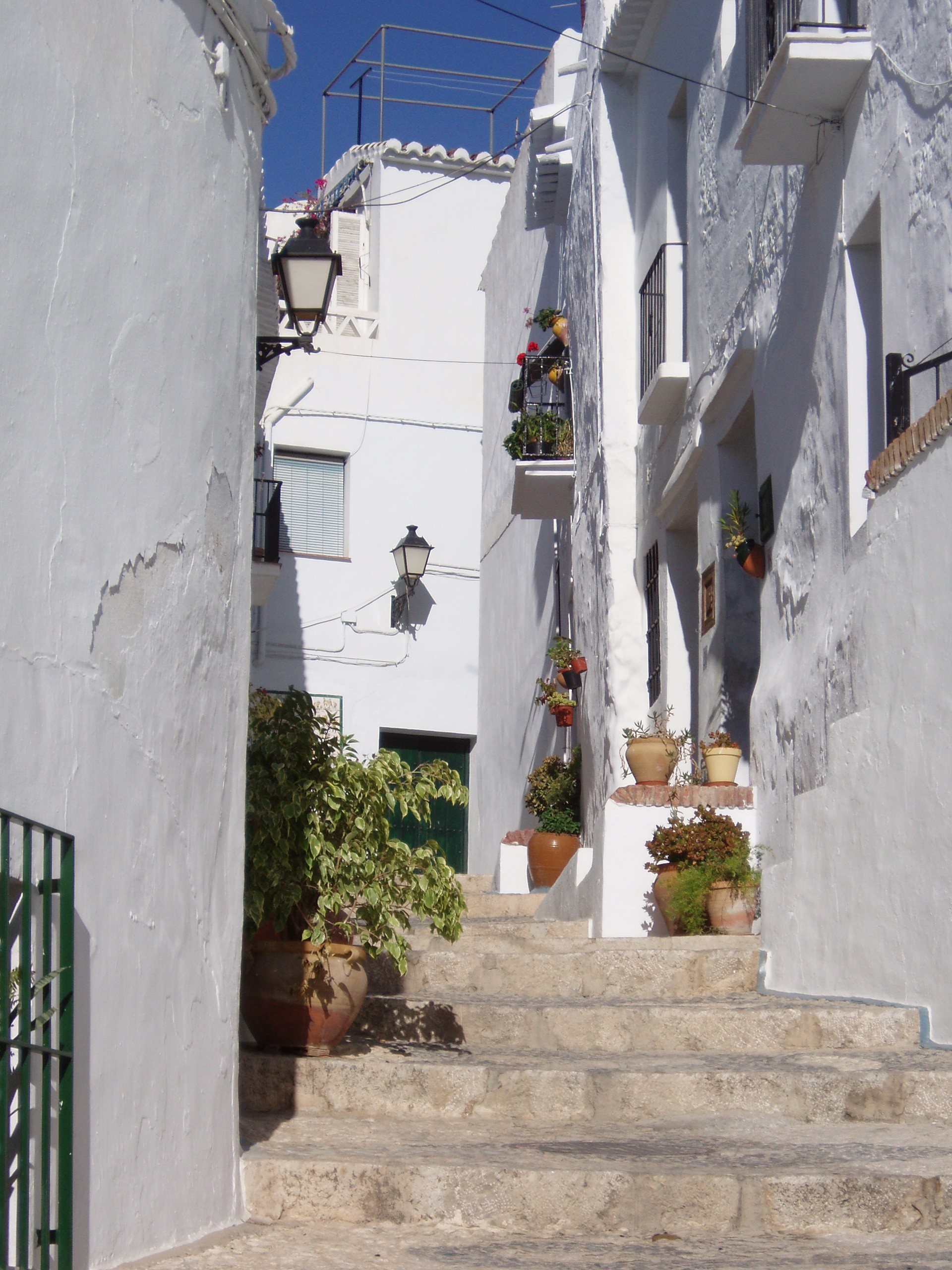 Impressions of Frigiliana (Málaga) in Andalucía, (España)